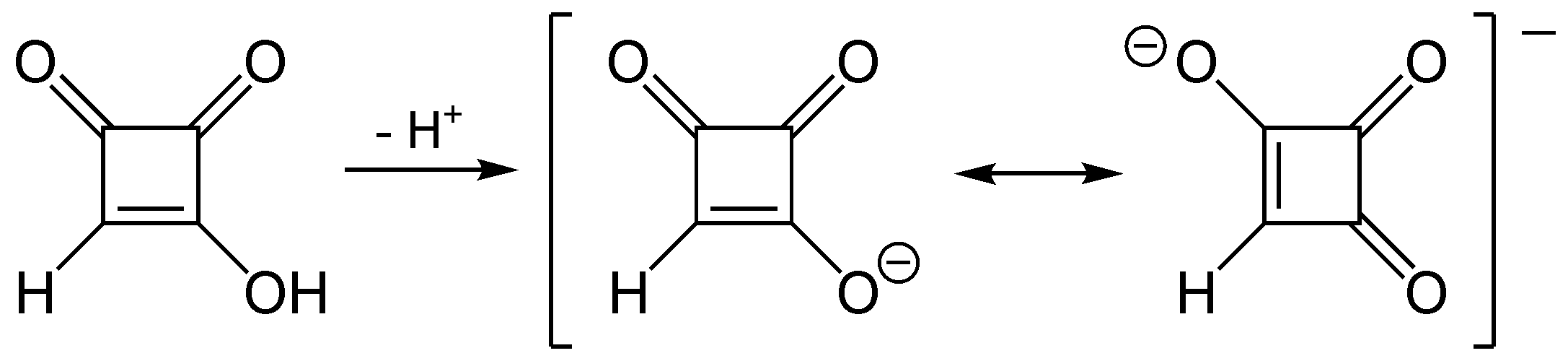 Deprotonierung von Moniliformin